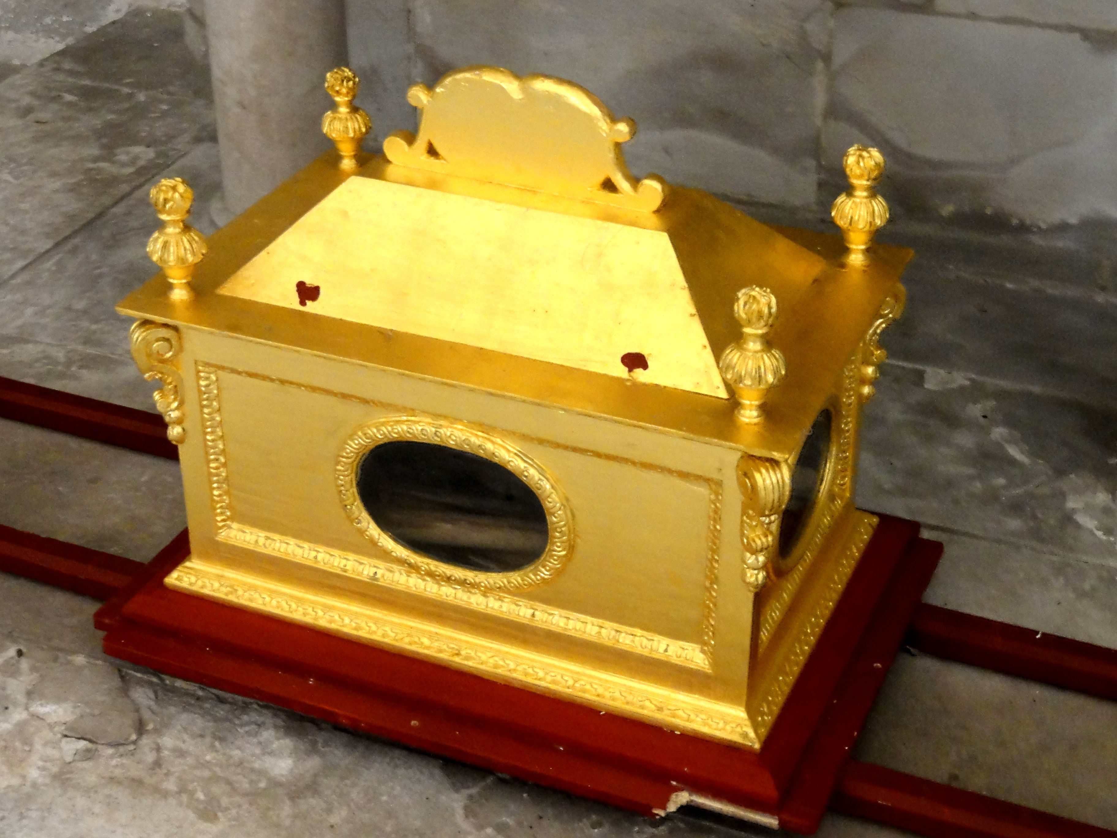 Châsse des reliques de saint Cyrin, compagnon de saint Clair.